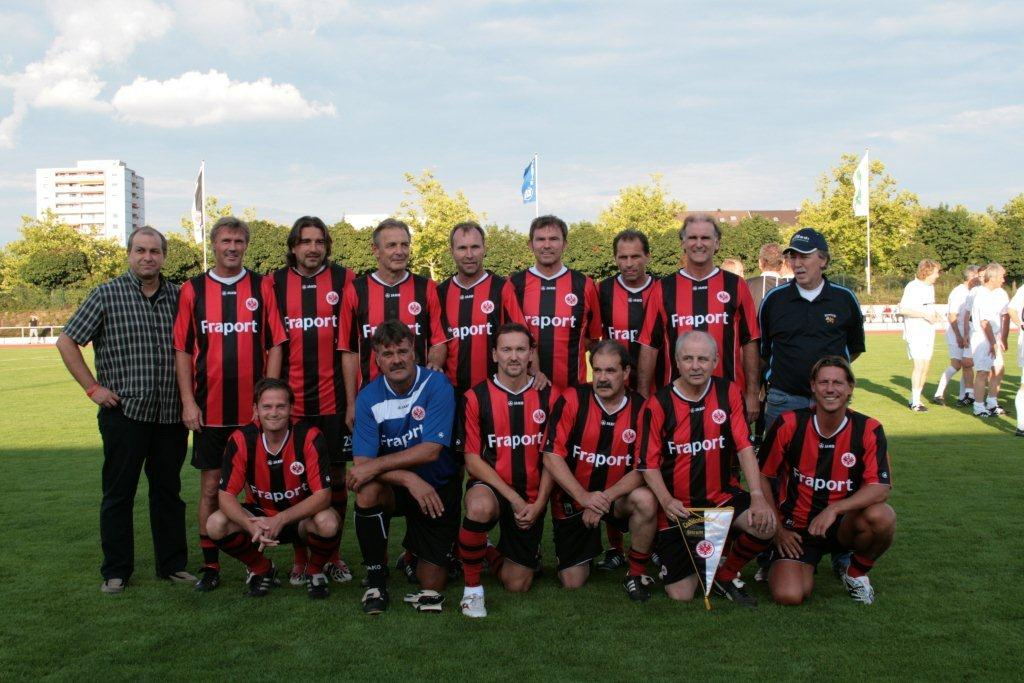 Eintracht Frankfurt Altstars at the benefit match KSC Allstars versus Eintracht Frankfurt Altstars on July, 30th 2010 in Karlsruhe